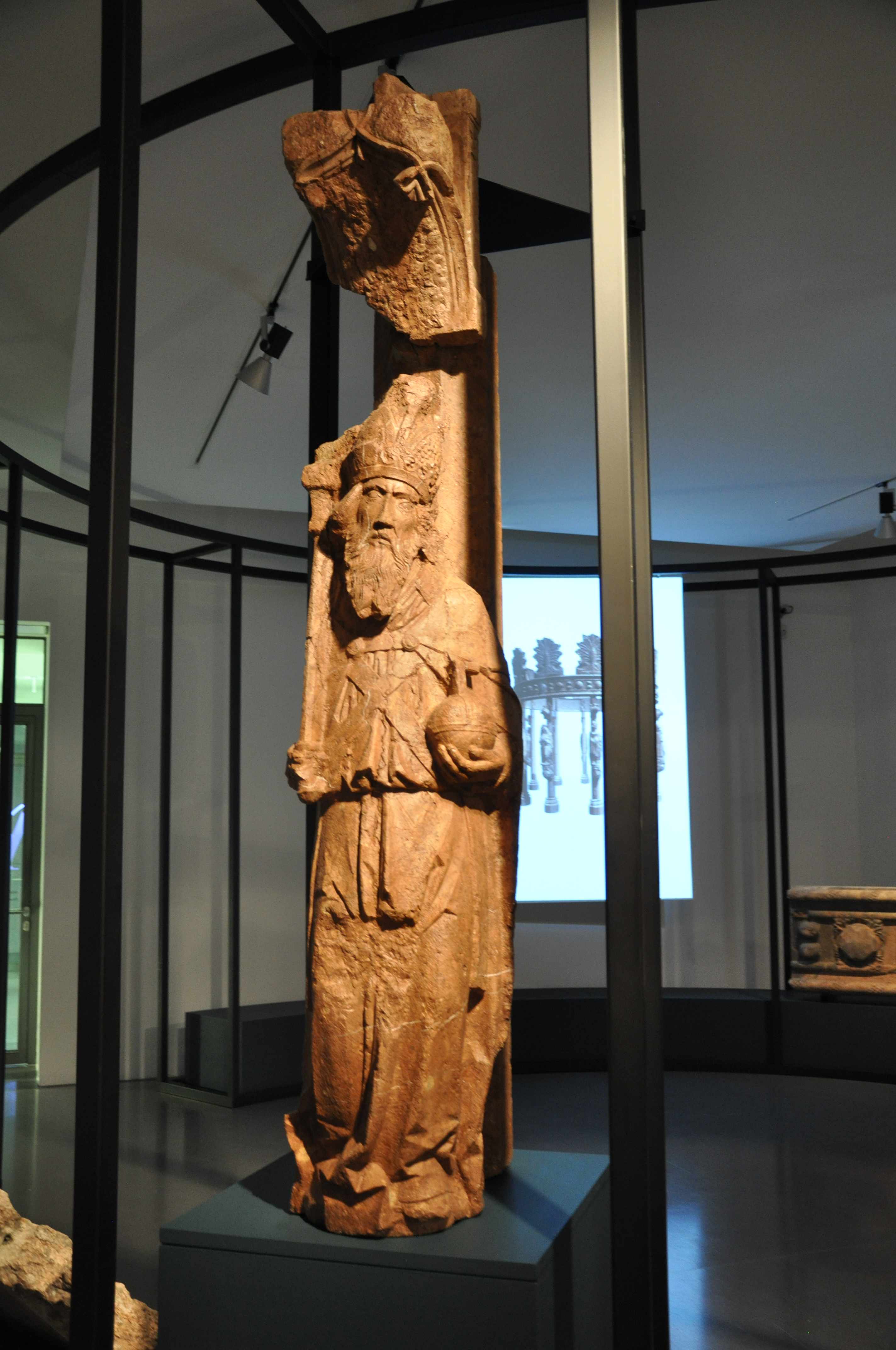 Skulptur vom geplanten Denkmal Kaiser Maximilians für den Speyrer Dom; Marmor, nach 1514; Salzburg Museum, Inv. 158/32